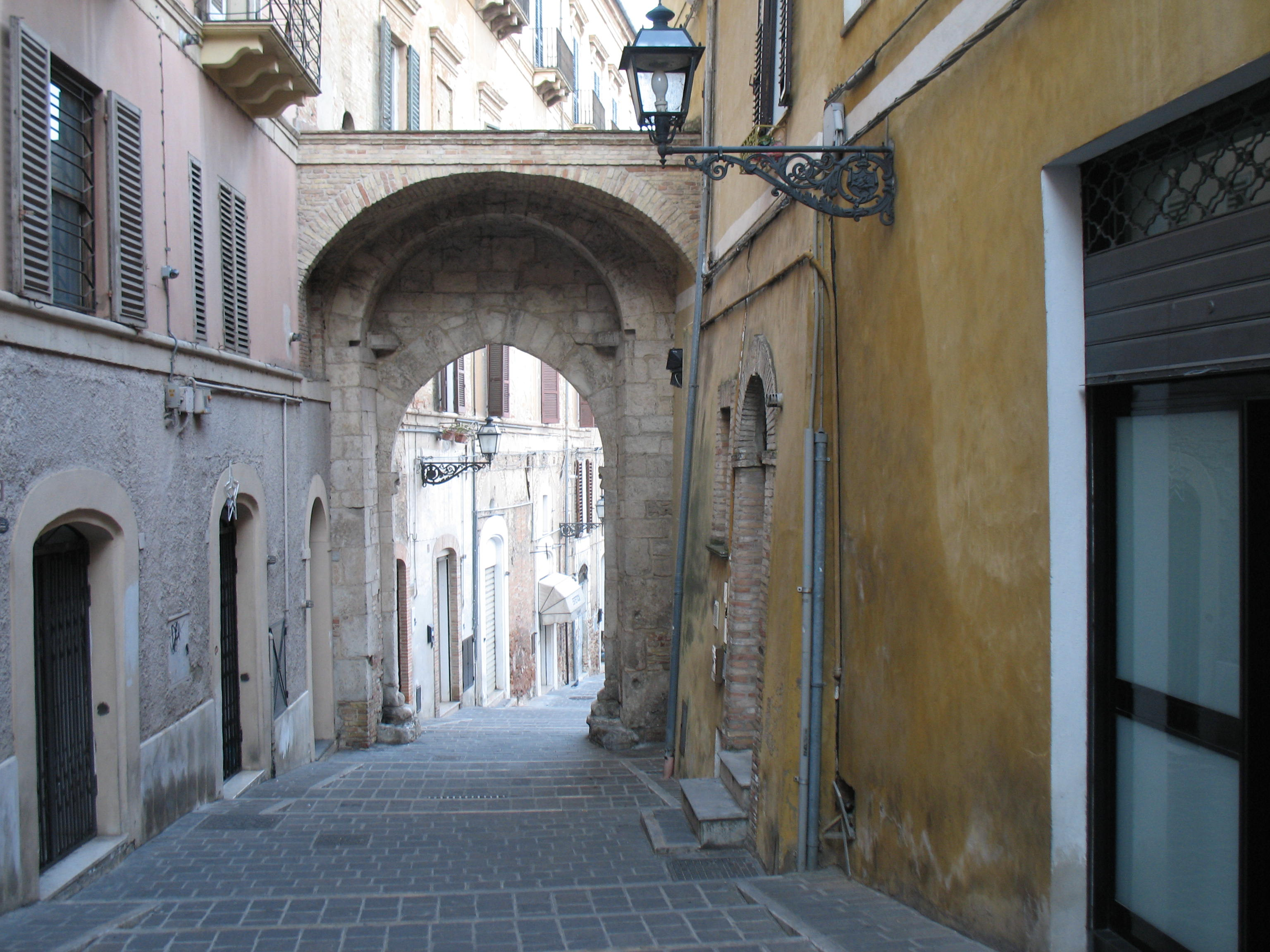 Ciò che rimane delle mura che circondavano Chieti